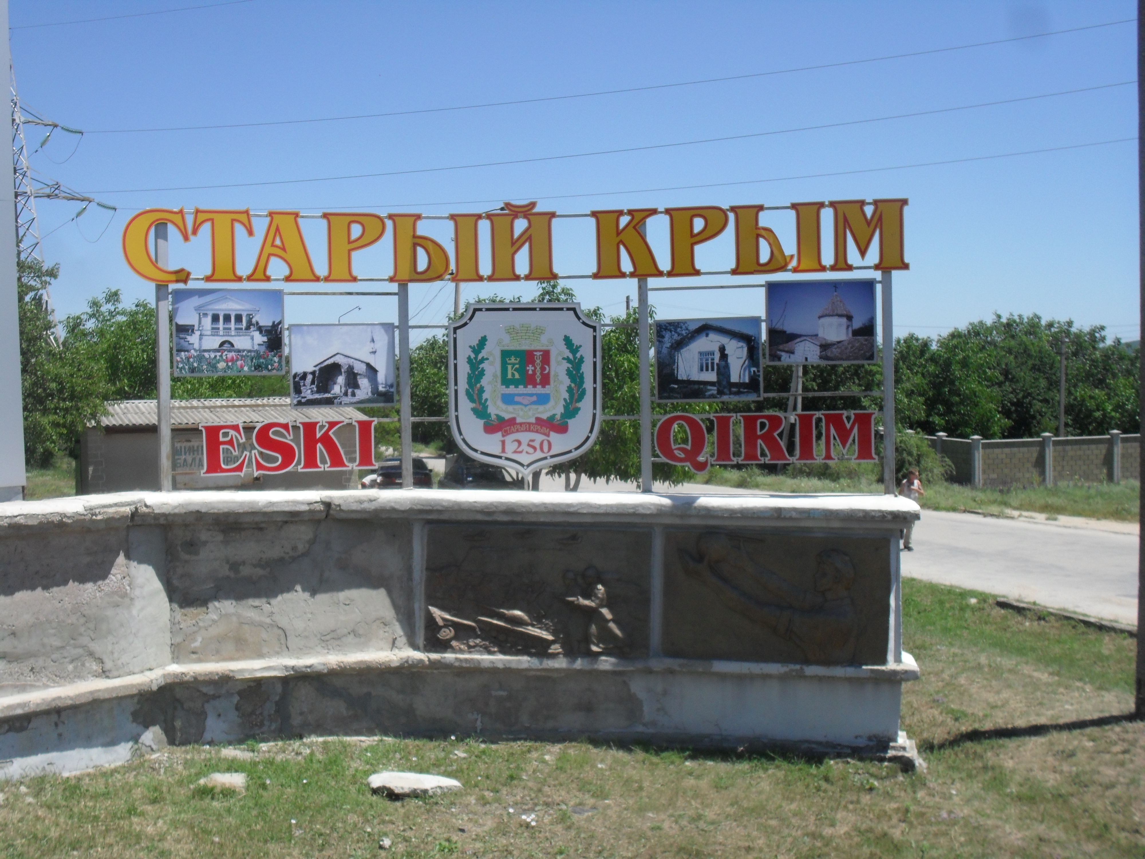 Знак при в'їзді до міста